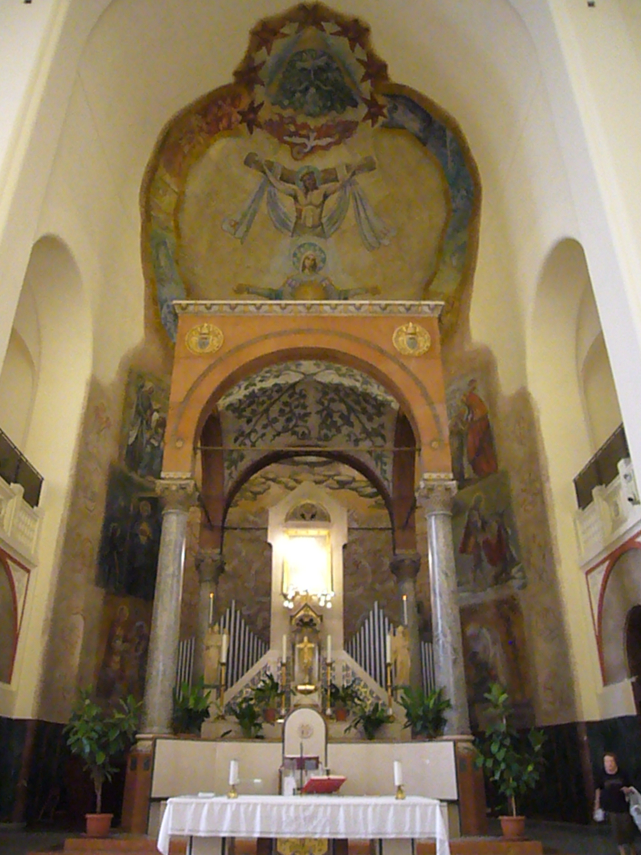 Roma, Santa Maria Liberatrice a Testaccio. Abside e altar maggiore